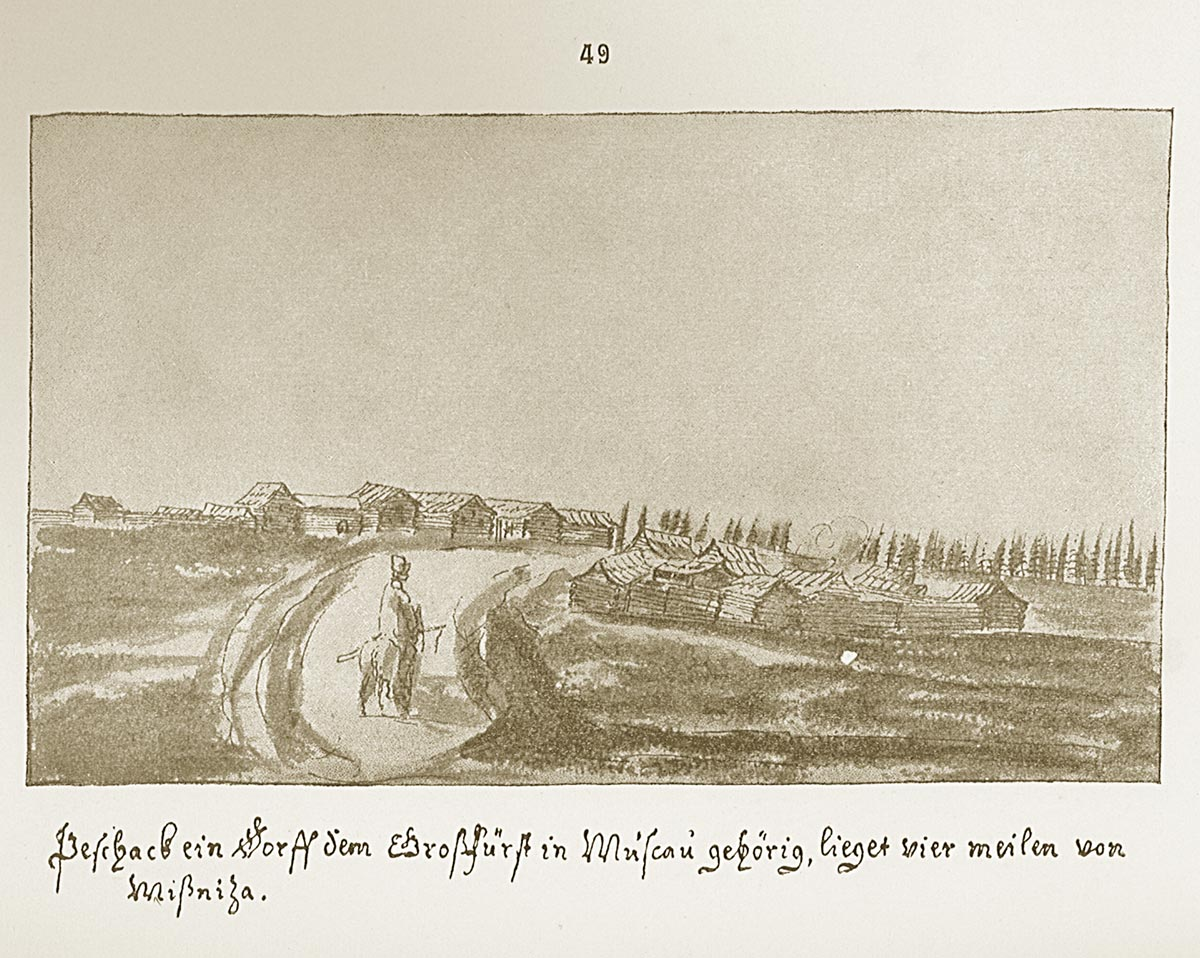 Пешки